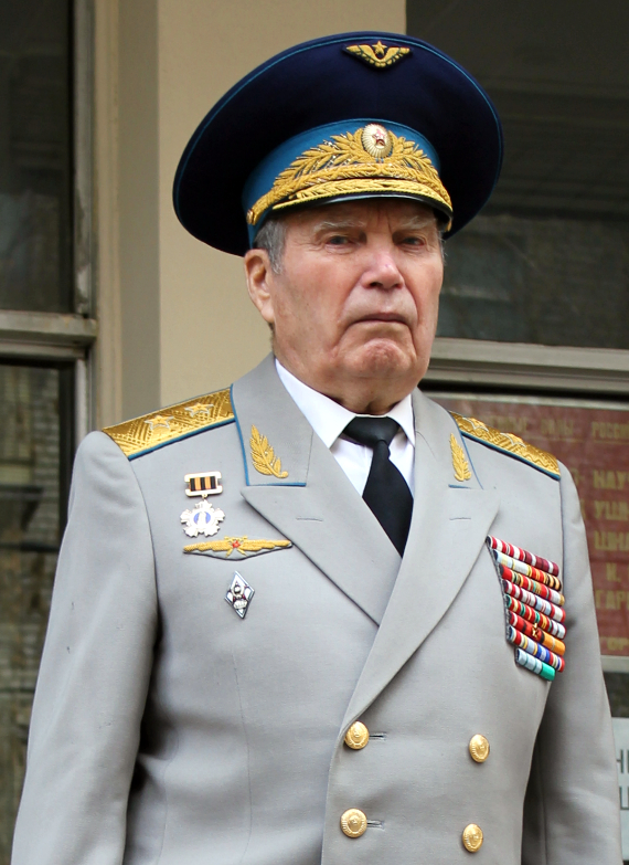 Сафронов Петр Павлович